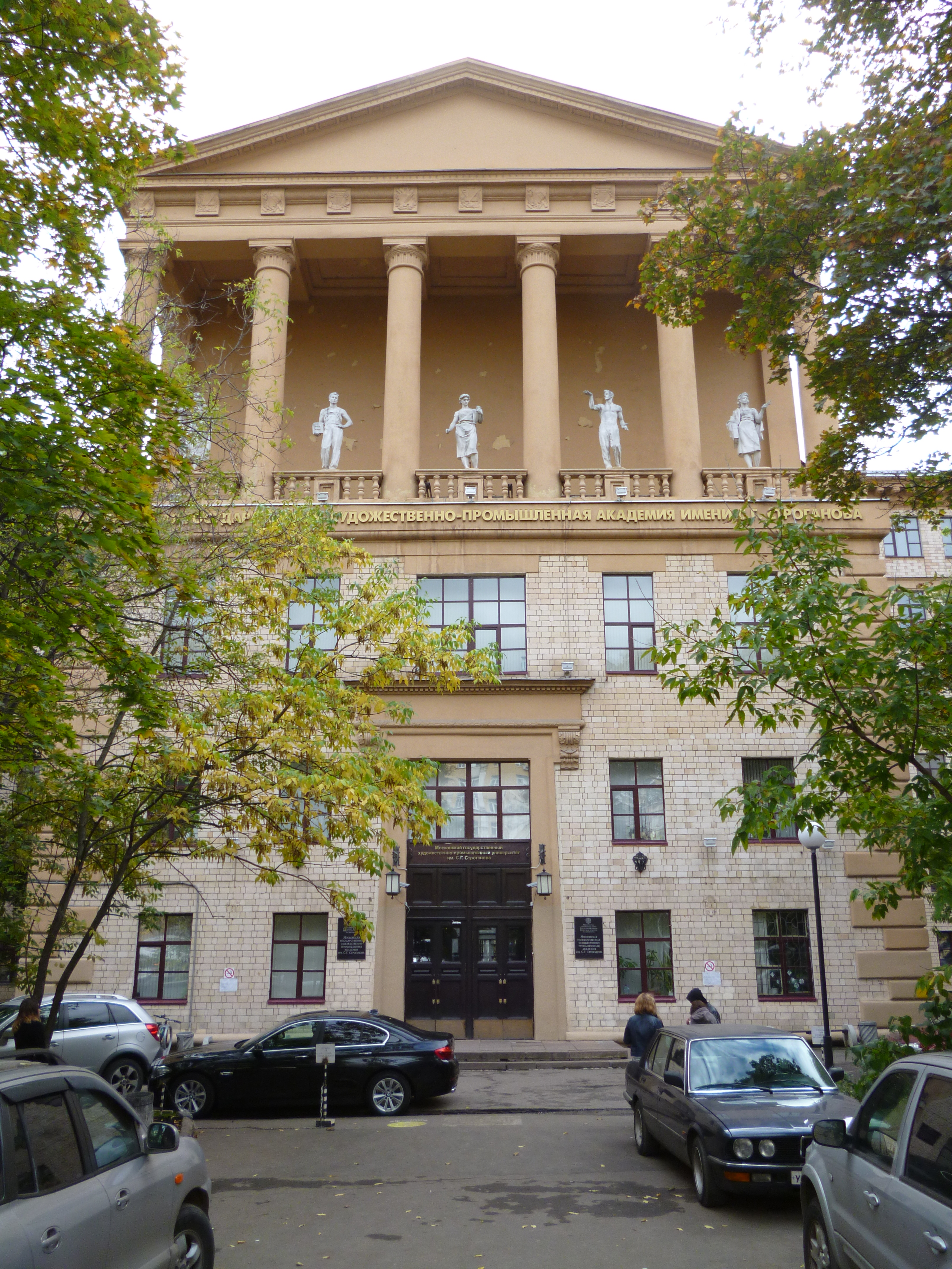 Здание Московского высшего художественно-промышленного училища: Волоколамское шоссе, дом 9, строение 1, Сокол, Северный округ, Москва